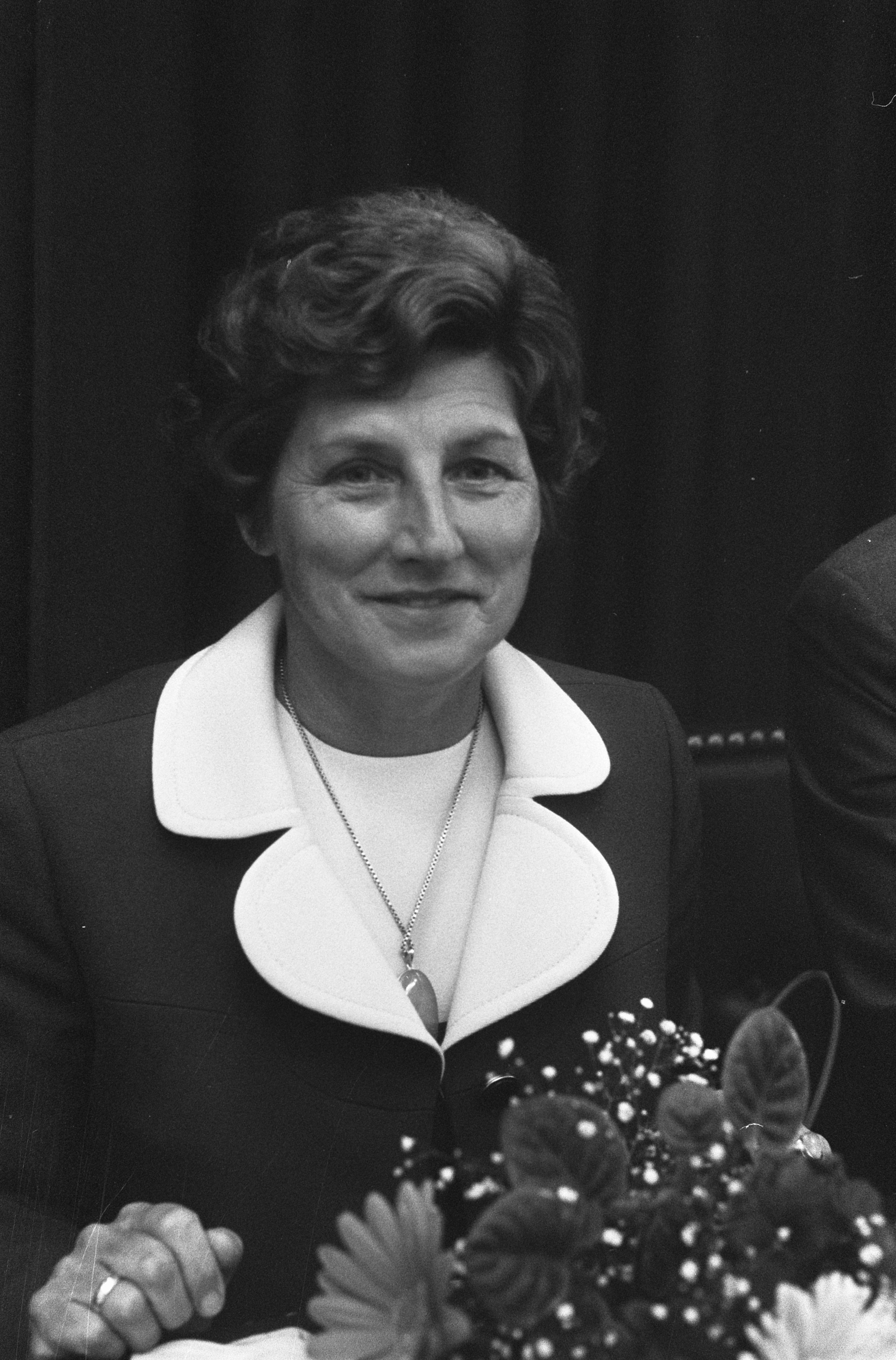 Collectie / Archief : Fotocollectie Anefo Reportage / Serie : [ onbekend ] Beschrijving : Mw. Van Veenendaal voor DS'70 in Tweede Kamer Datum : 28 juli 1970 Locatie : Den Haag, Zuid-Holland Trefwoorden : parlementariërs, politiek, portretten Persoonsnaam : Veenendaal-van Meggelen, S. van Fotograaf : Koch, Eric / Anefo Auteursrechthebbende : Nationaal Archief Materiaalsoort : Negatief (zwart/wit) Nummer archiefinventaris : bekijk toegang 2.24.01.05 Bestanddeelnummer : 923-7067